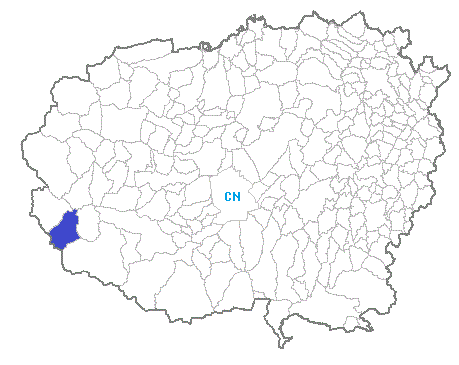 Posizione del comune nella provincia di Cuneo